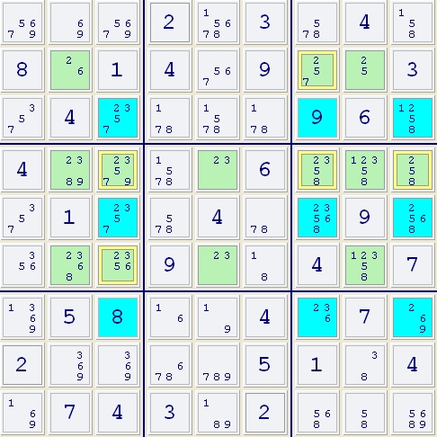 Sudoku strategy : Swordfish